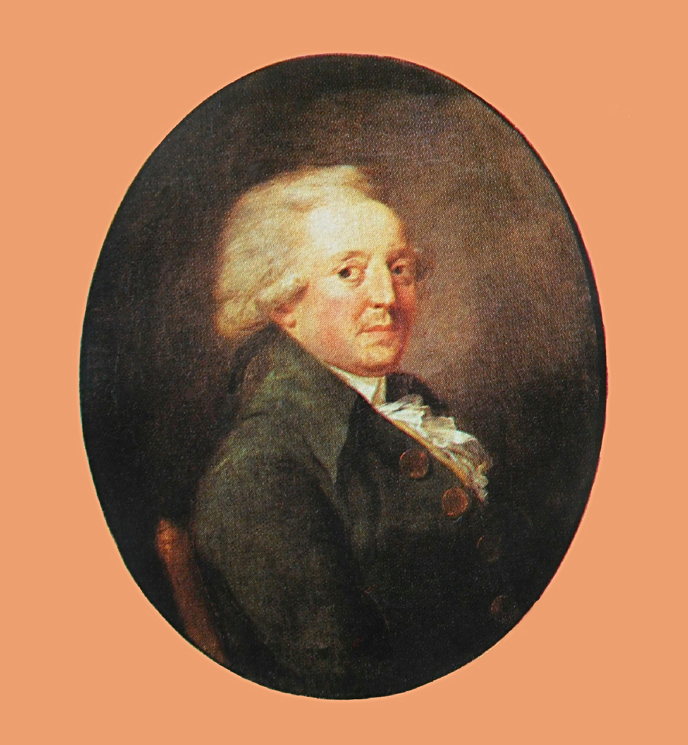 Portrait du marquis de Condorcet